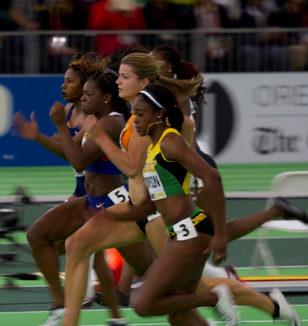 436 halve finales 60m dames